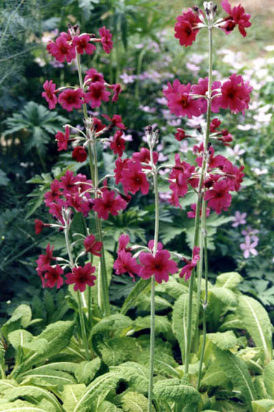 Primula pulverulenta